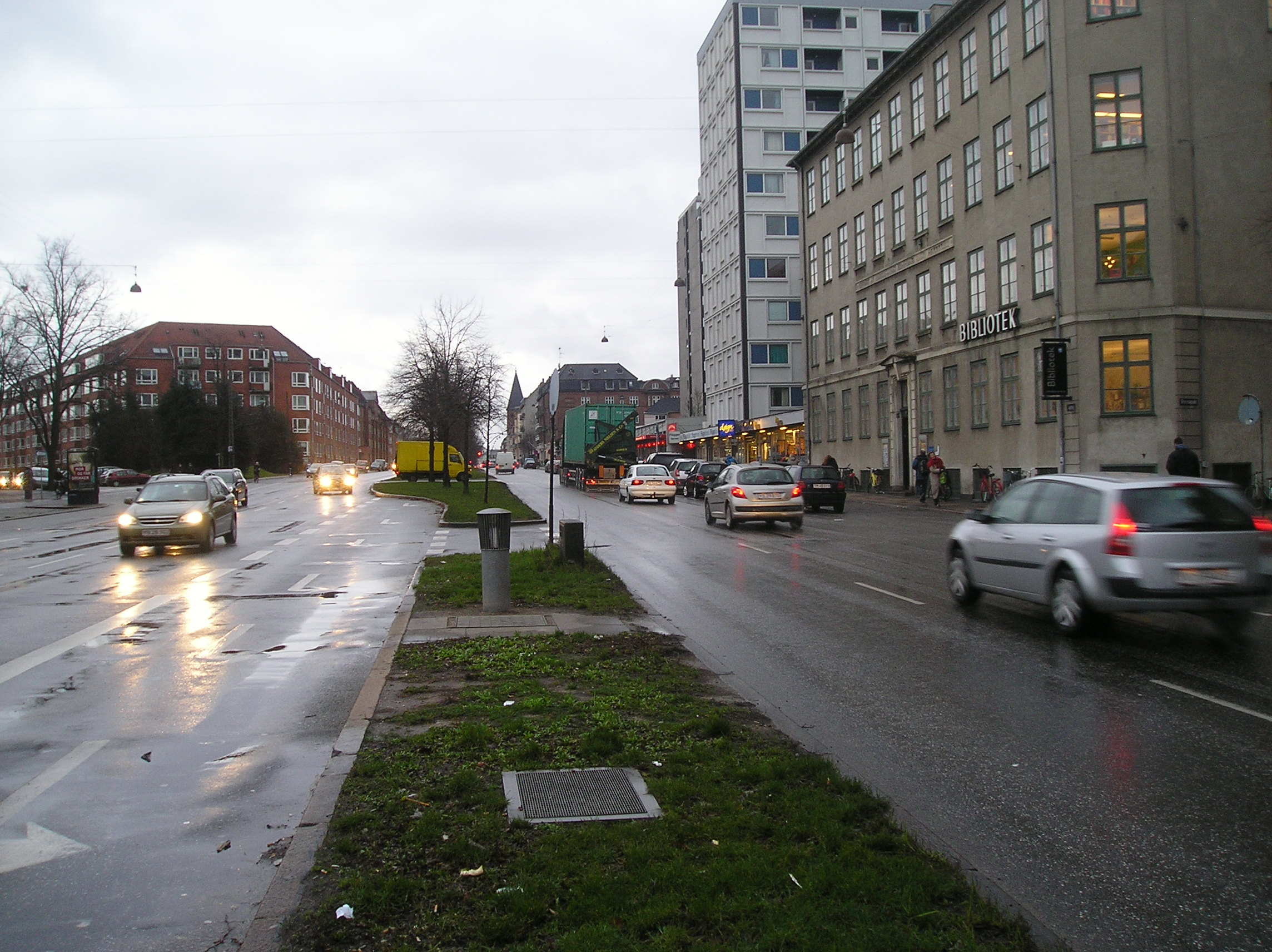 The Copenhagen street Jagtvej seen from the end at Østerbrogade.